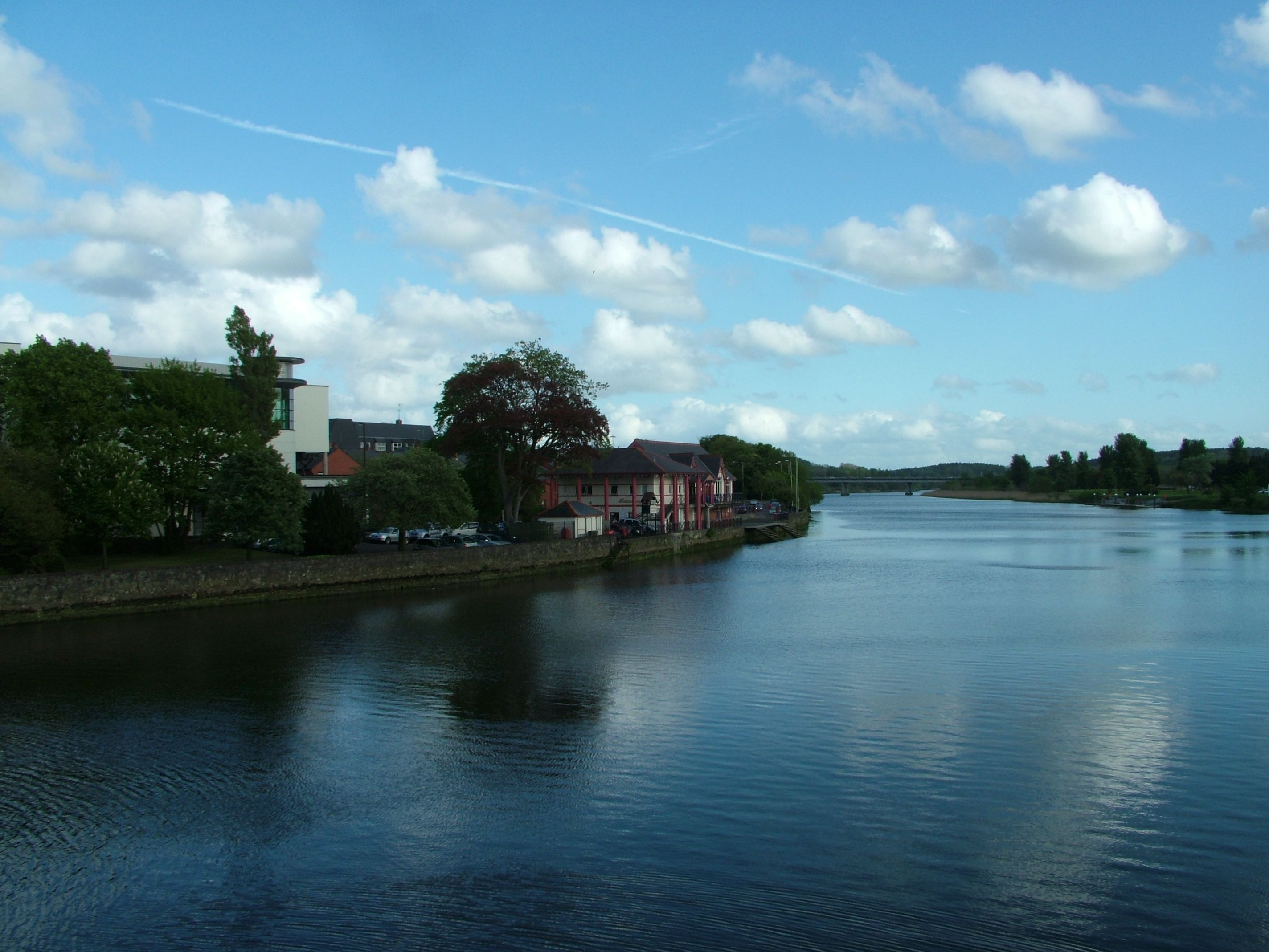 Der Fluss Bann in Nordirland